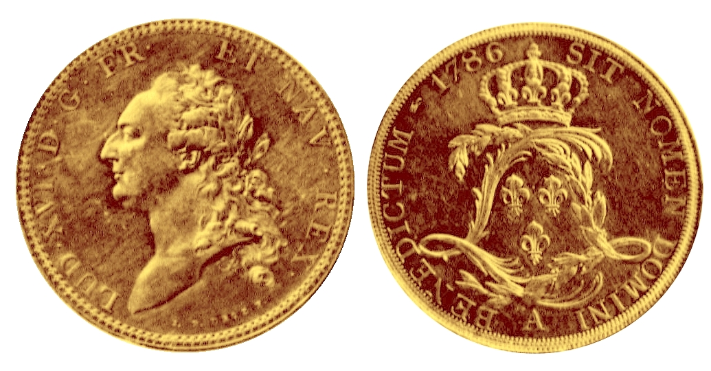 Essai en or de l'écu de Louis XVI, 1786, dit de Calonne, par Jean-Pierre Droz, 40 mm. 47,13 gr. Tranche inscrite. Collection du Cabinet des Médailles BnF - Collection Beistegui 388. . Image colorisée.